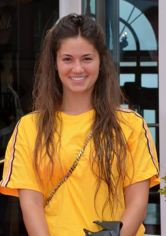 Ophélie Bau au festival du film de Cabourg